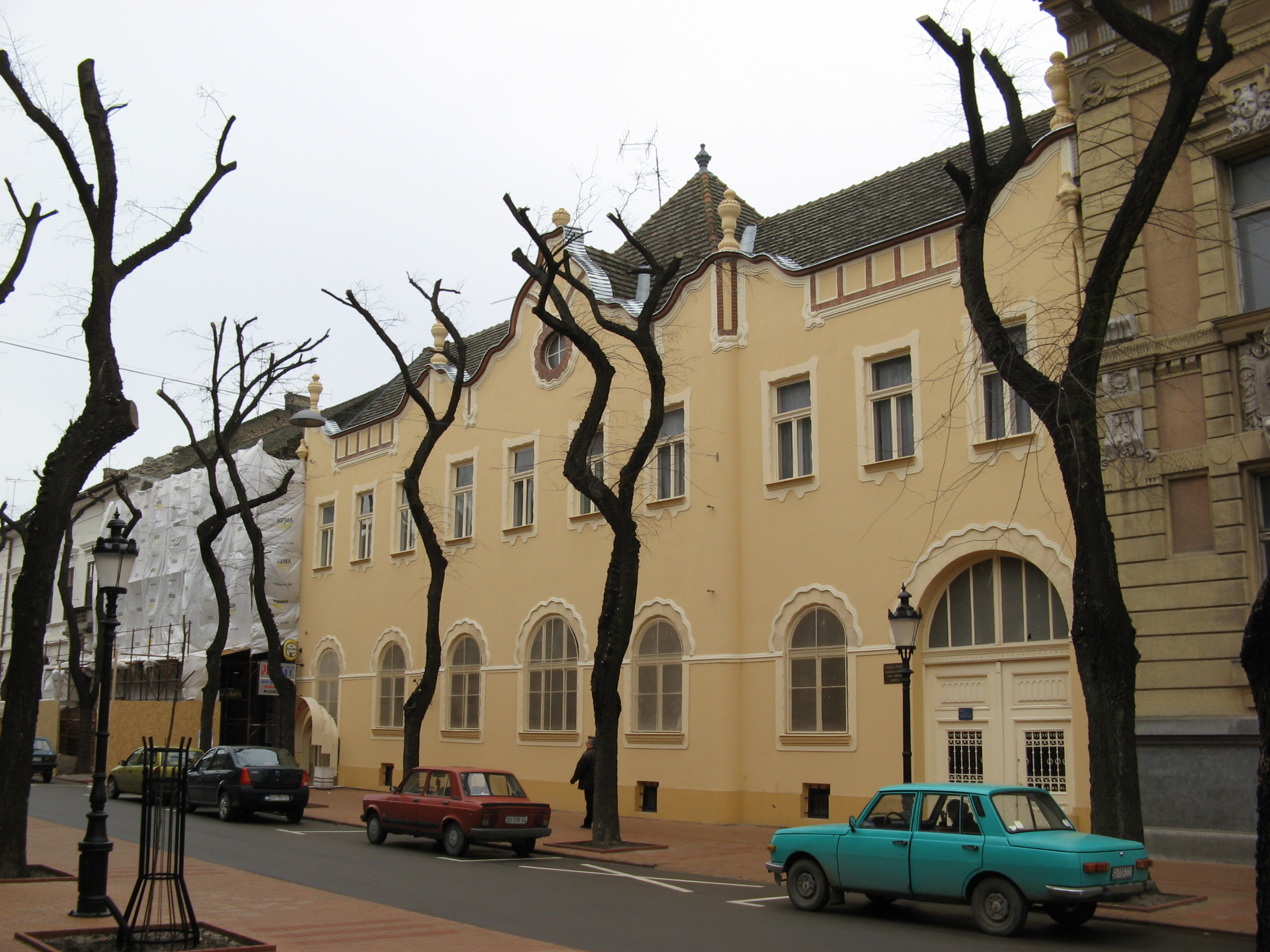 Зграда јеврејске црквене општине подигнута је 1904. године према пројектима Марцела Комора и Деже Јакаба, архитеката из Будимпеште, у стилу мађарске сецесије. Заједно са Синагогом, овај објекат симболички представља круну дуготрајног процеса еманципације Јевреја у Суботици.